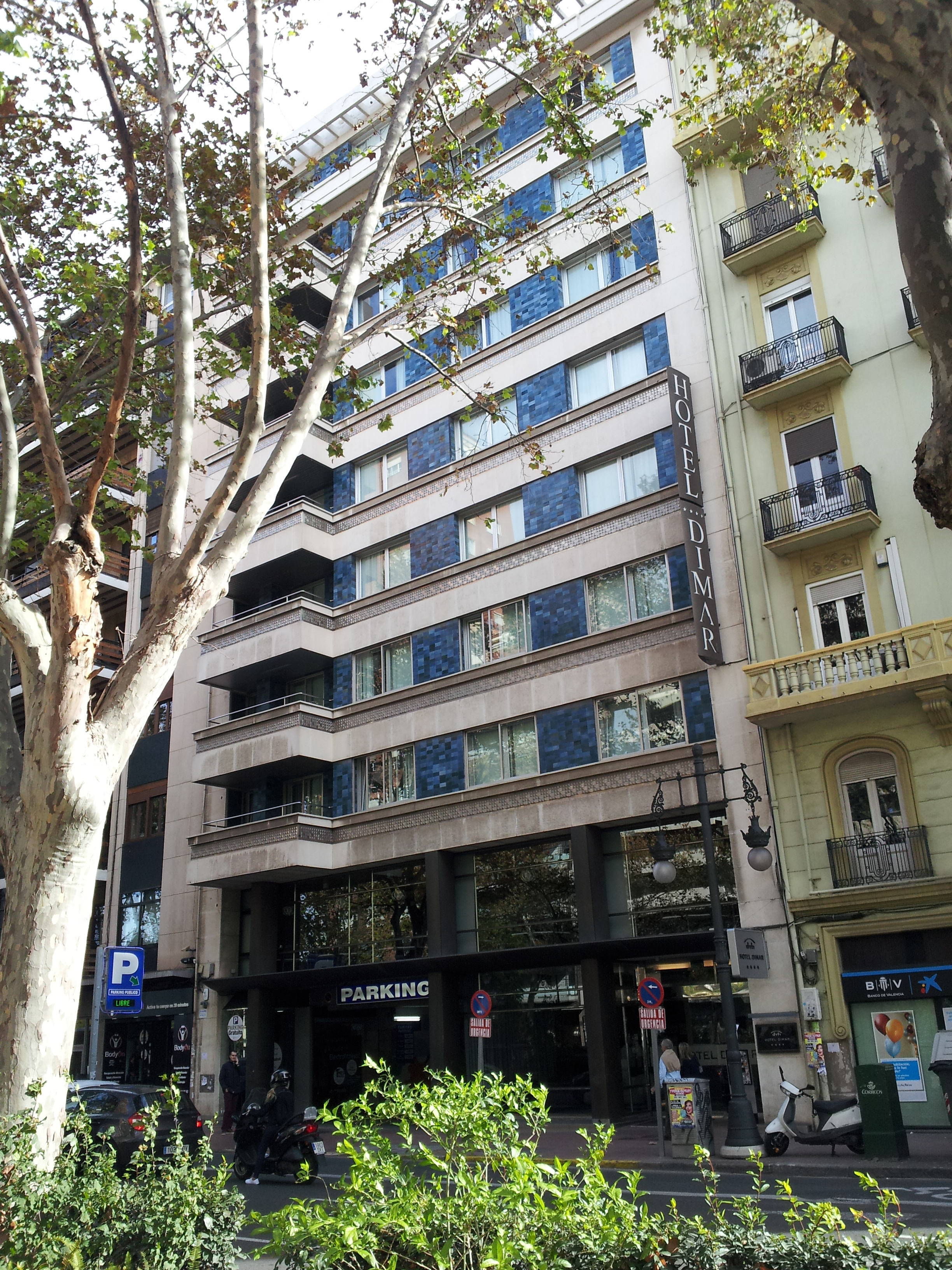 VLC